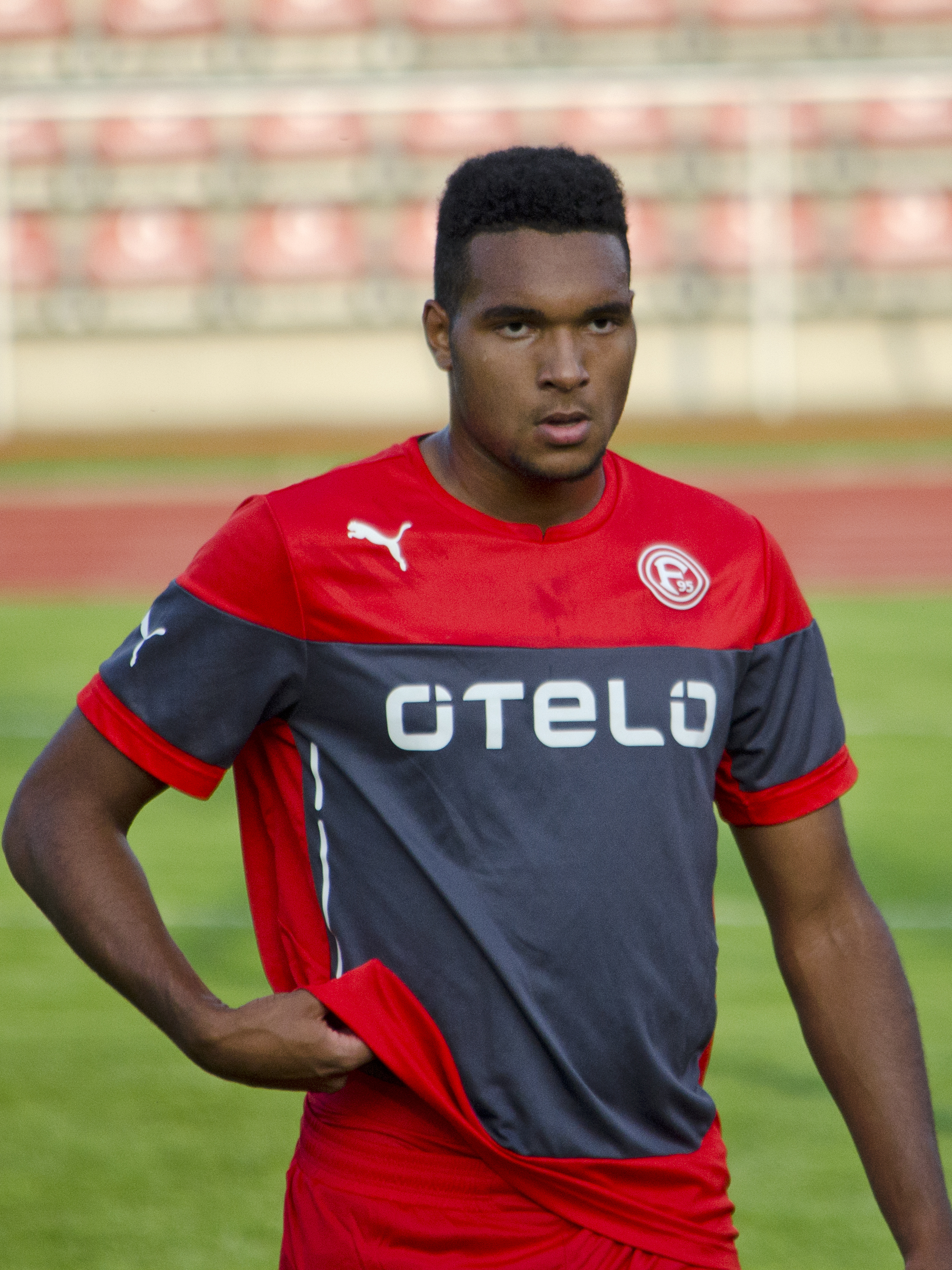 Jonathan Tah, deutscher Fußballspieler